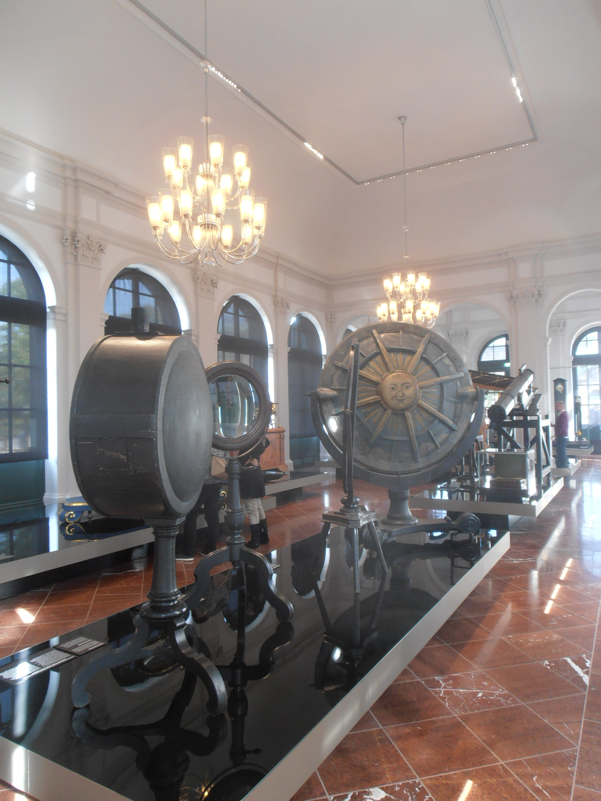 Festsaal des Mathematisch-Physikalischen Salons im Zwinger Dresden